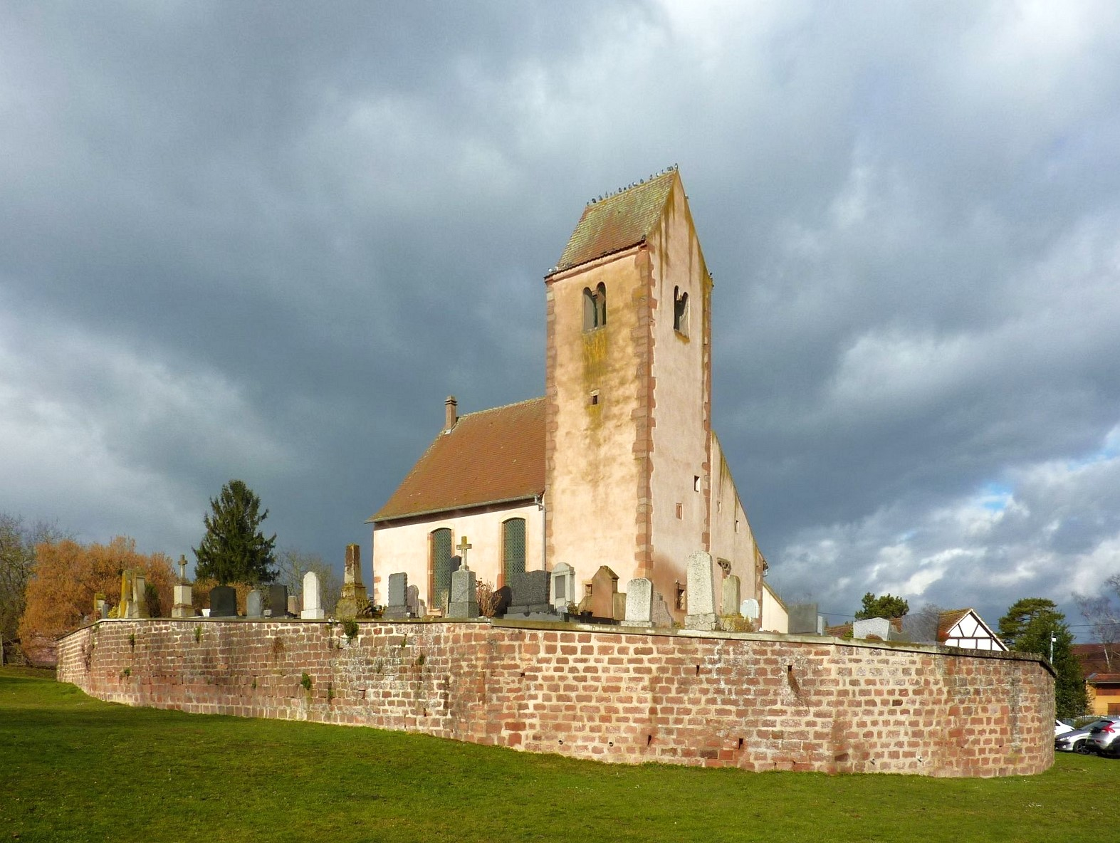 Église Saint-Arbogast (Bourgheim)